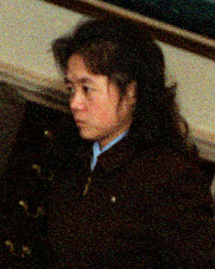 Kim Ok. 金玉